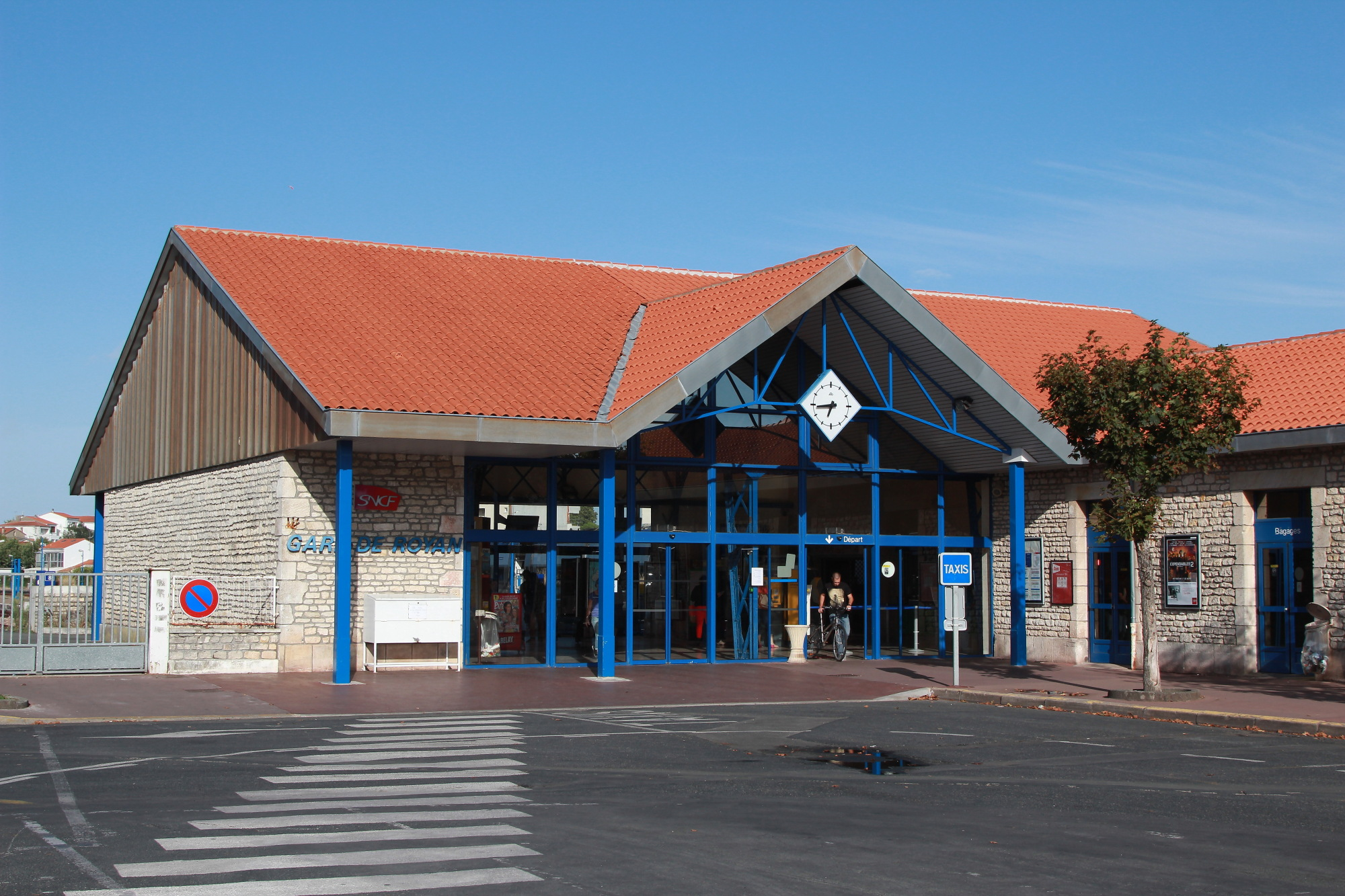 Le bâtiment voyageurs de la gare de Royan, vu côté cour.